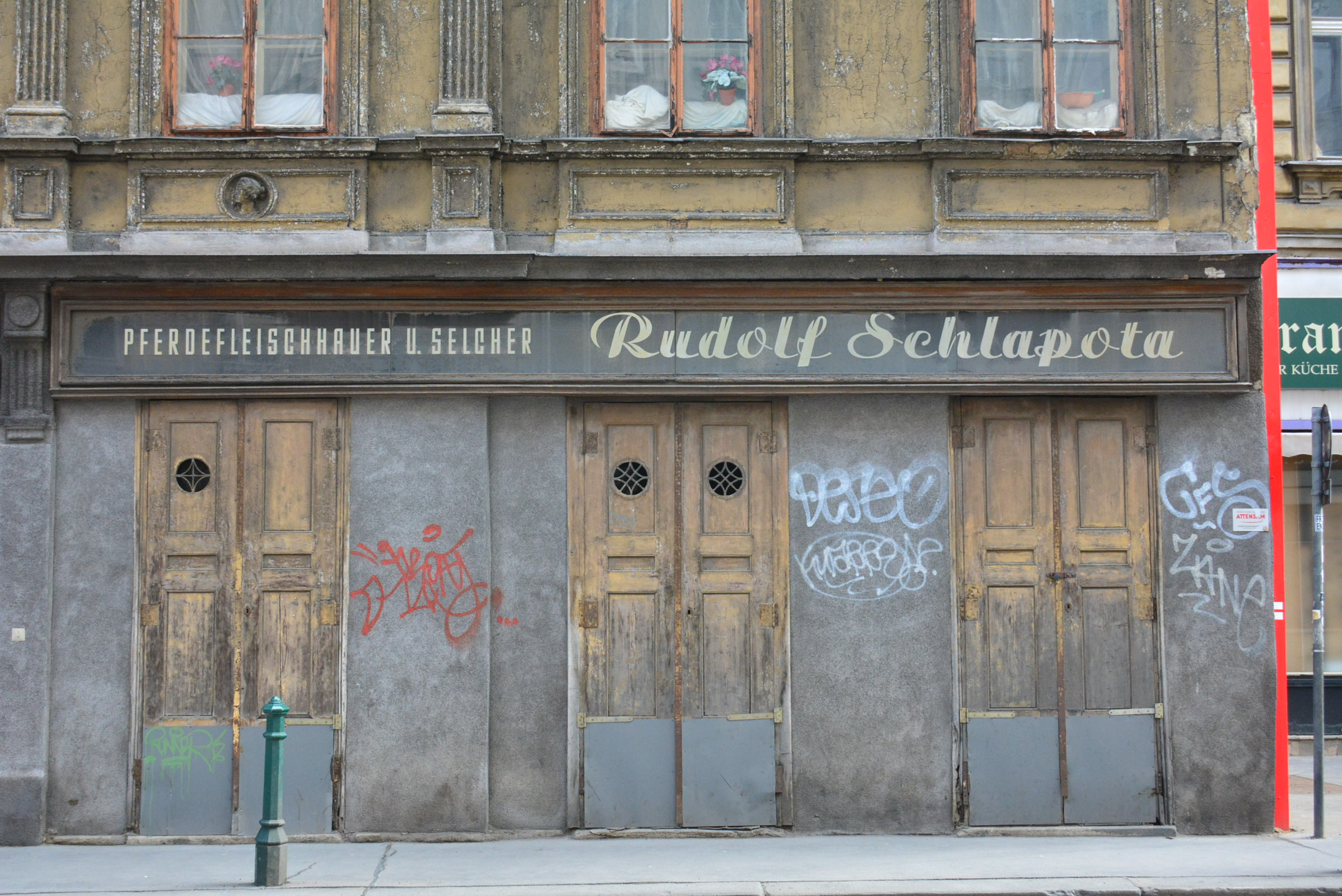 Bürgerhaus Zur Heiligen Dreifaltigkeit, Liechtensteinstraße im Jahr 2017